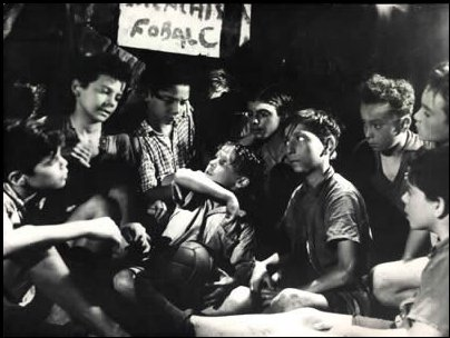 Foto de la película Pelota de trapo (1948), de Leopoldo Torres Ríos.